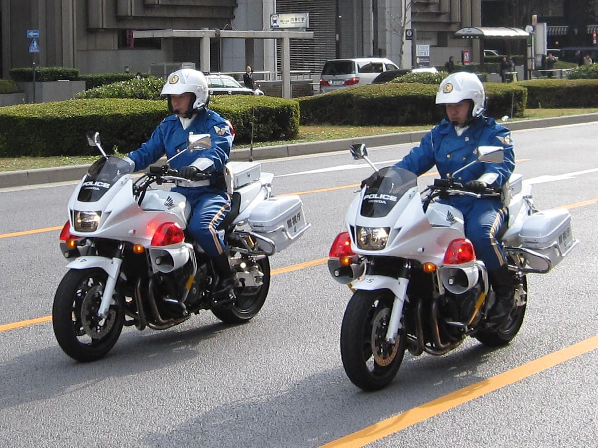 白バイCB1300 SUPER BOL D'OR